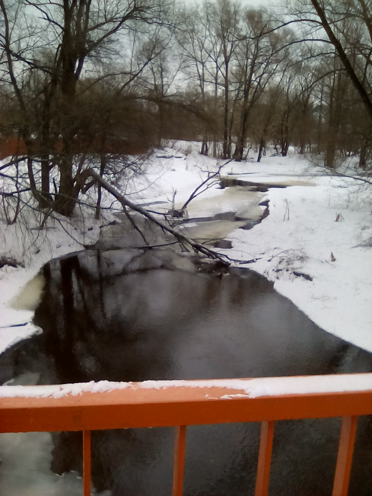 Мостик через реку Вохна в Павловом Посаде